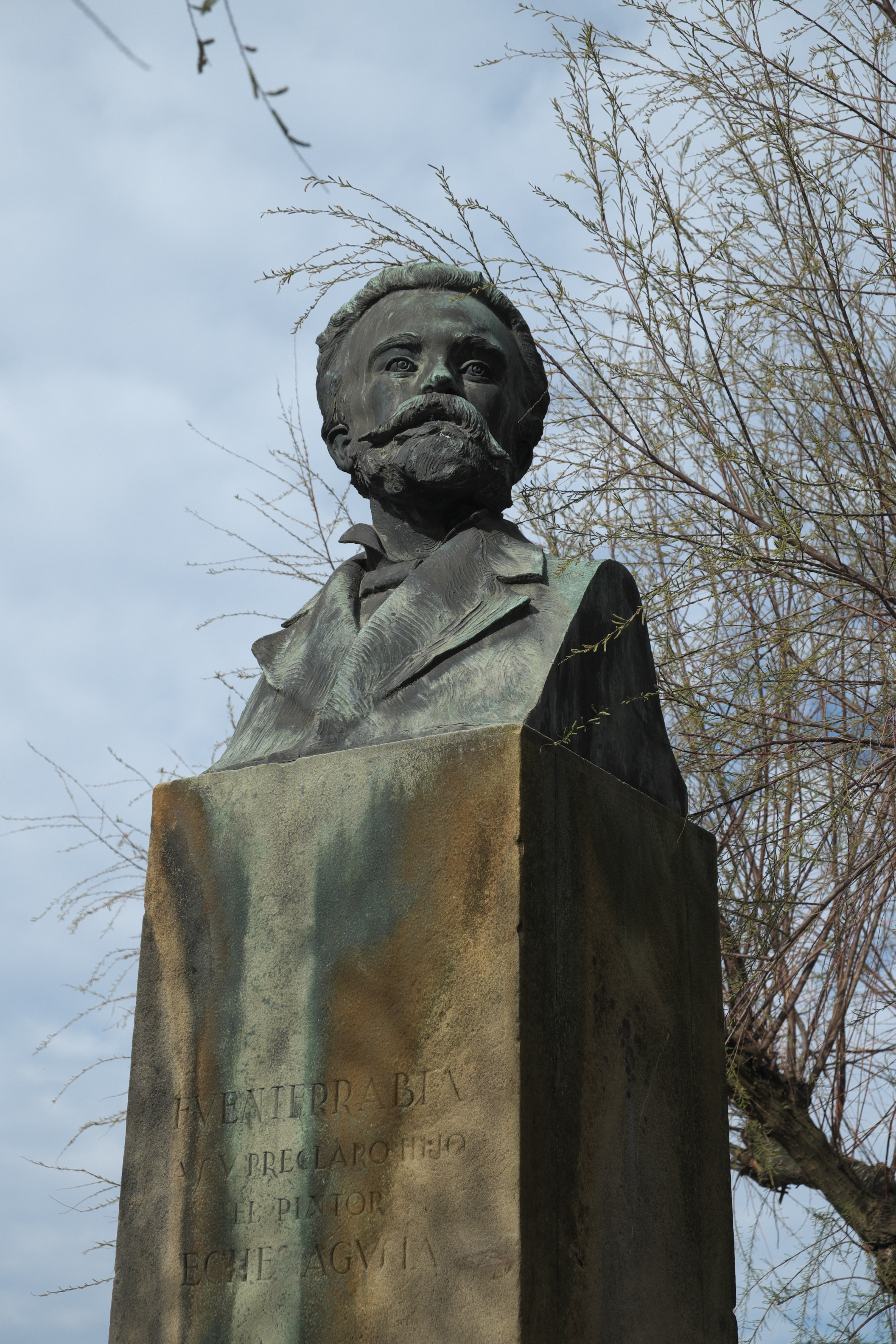 Büste des Malers Jose Etxenagusia in Hondarribia in der Provinz Gipuzkoa (Autonome Gemeinschaft Baskenland/Spanien)